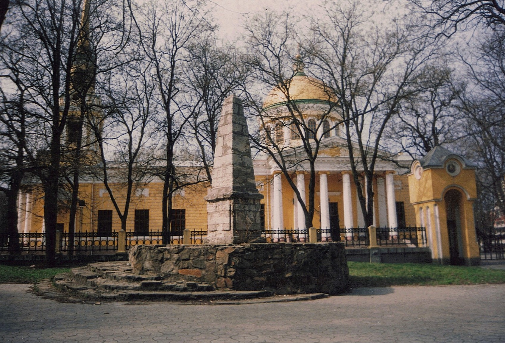 Екатерининская миля в Днепропетровске